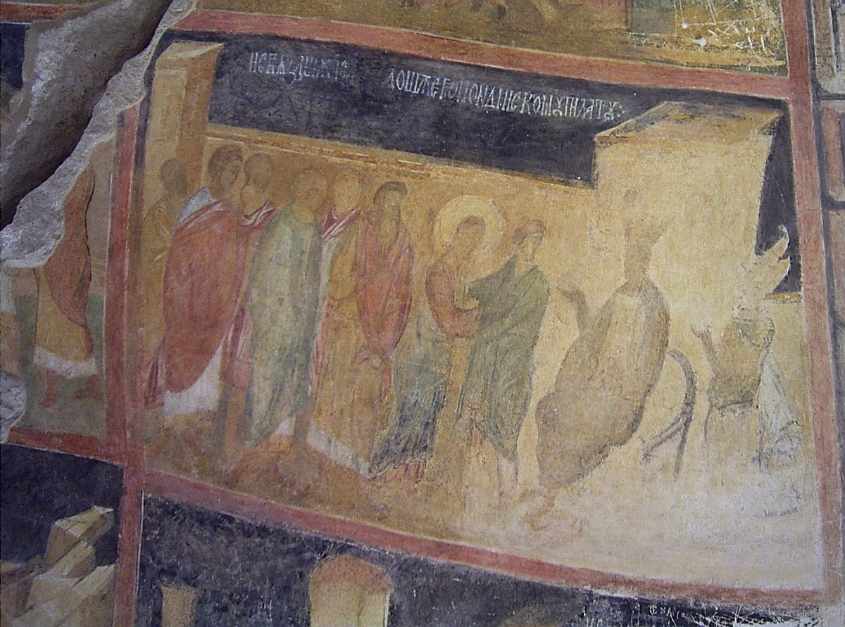 Felskirche Ivanovo Kirchendecke Detail